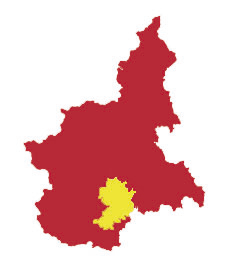 Umriss der Langhe